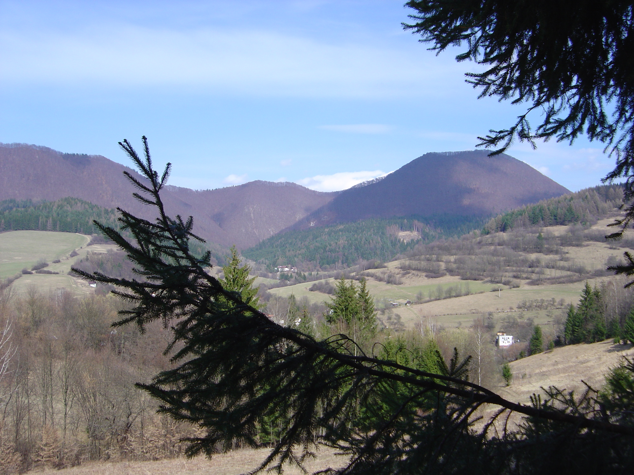 Dolný Vadičov